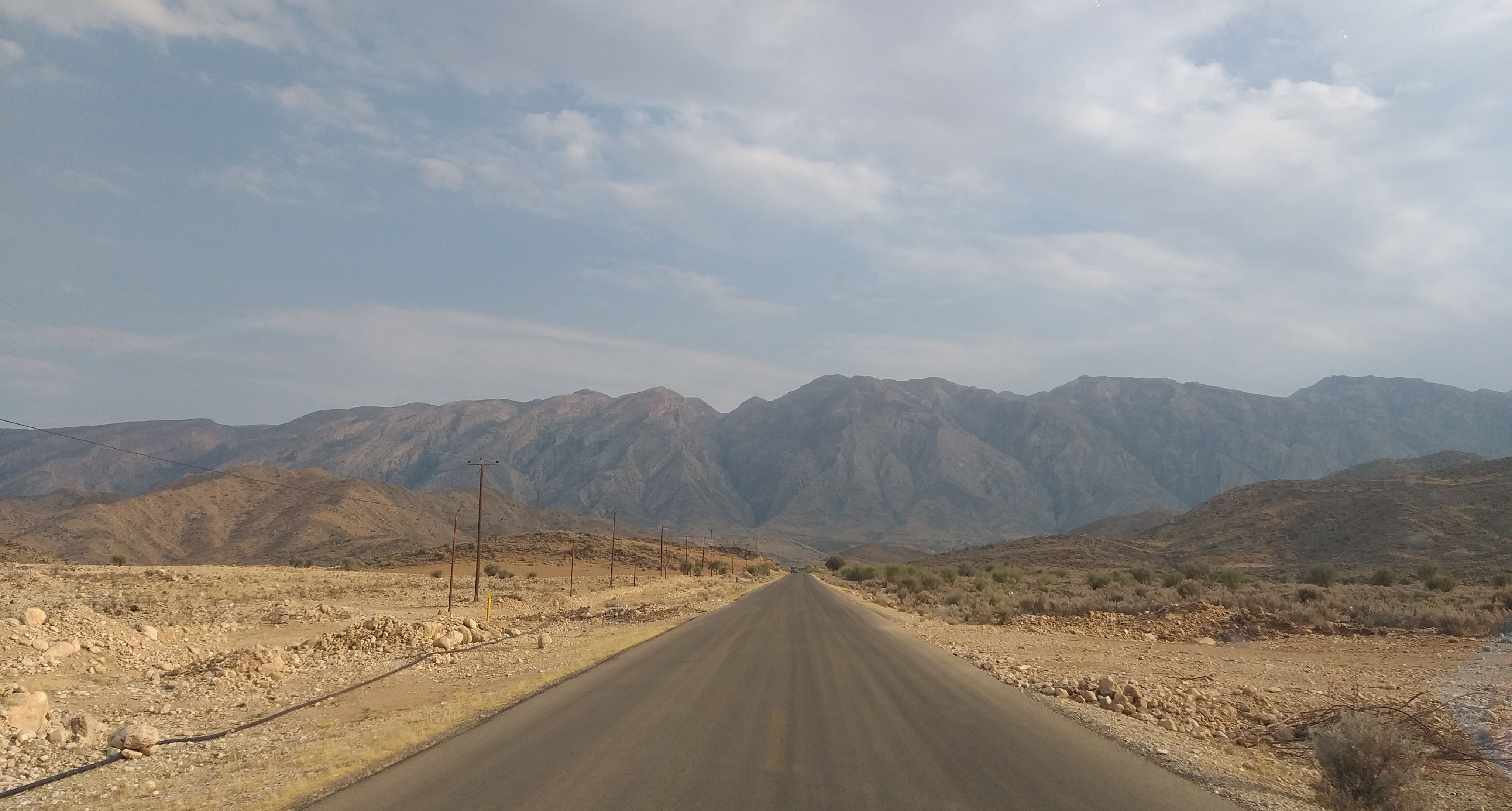 کوه سپیدار